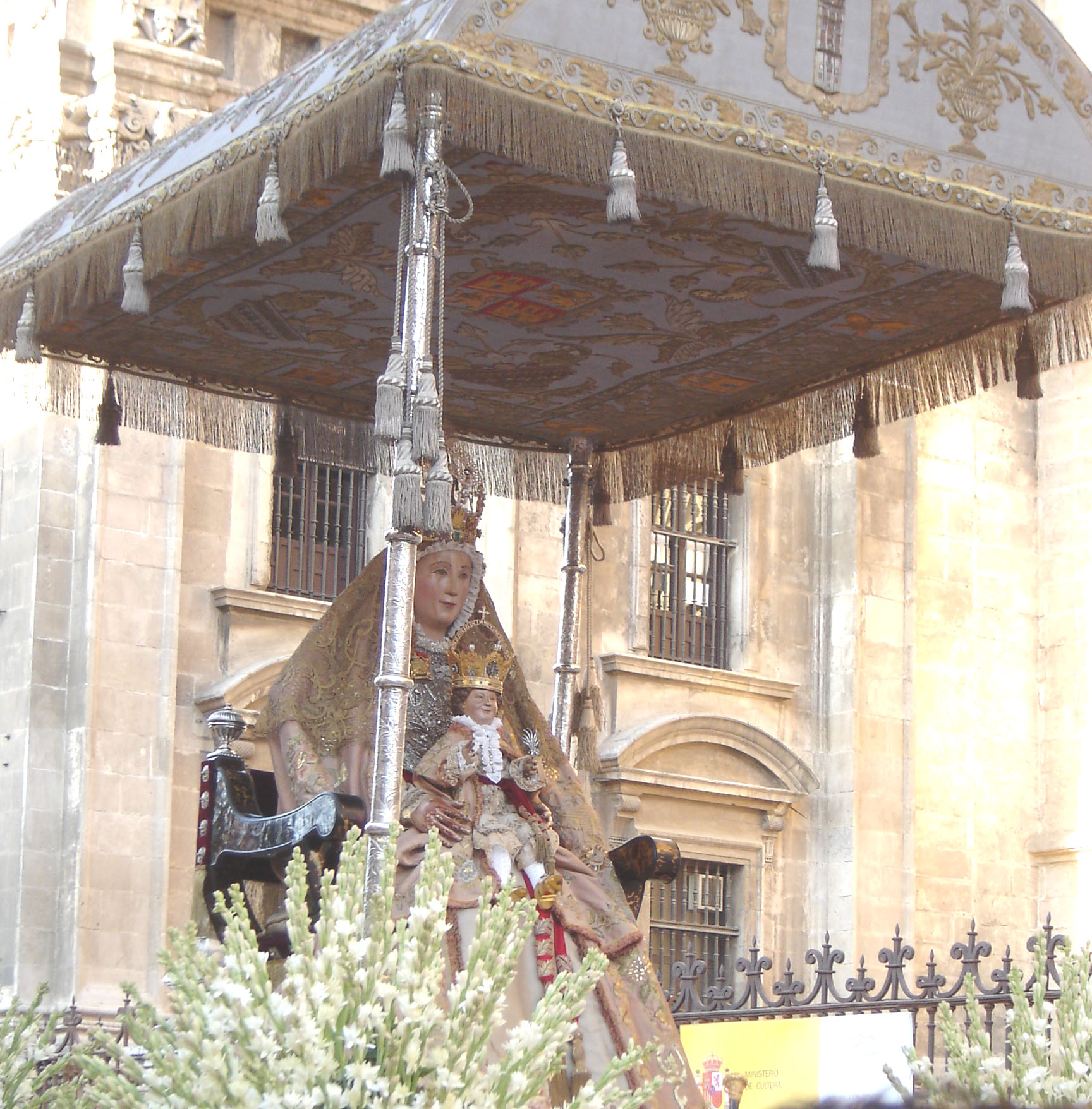 Procesión Virgen de los Reyes en Sevilla. Imagen de la Virgen de los Reyes casi de frente.